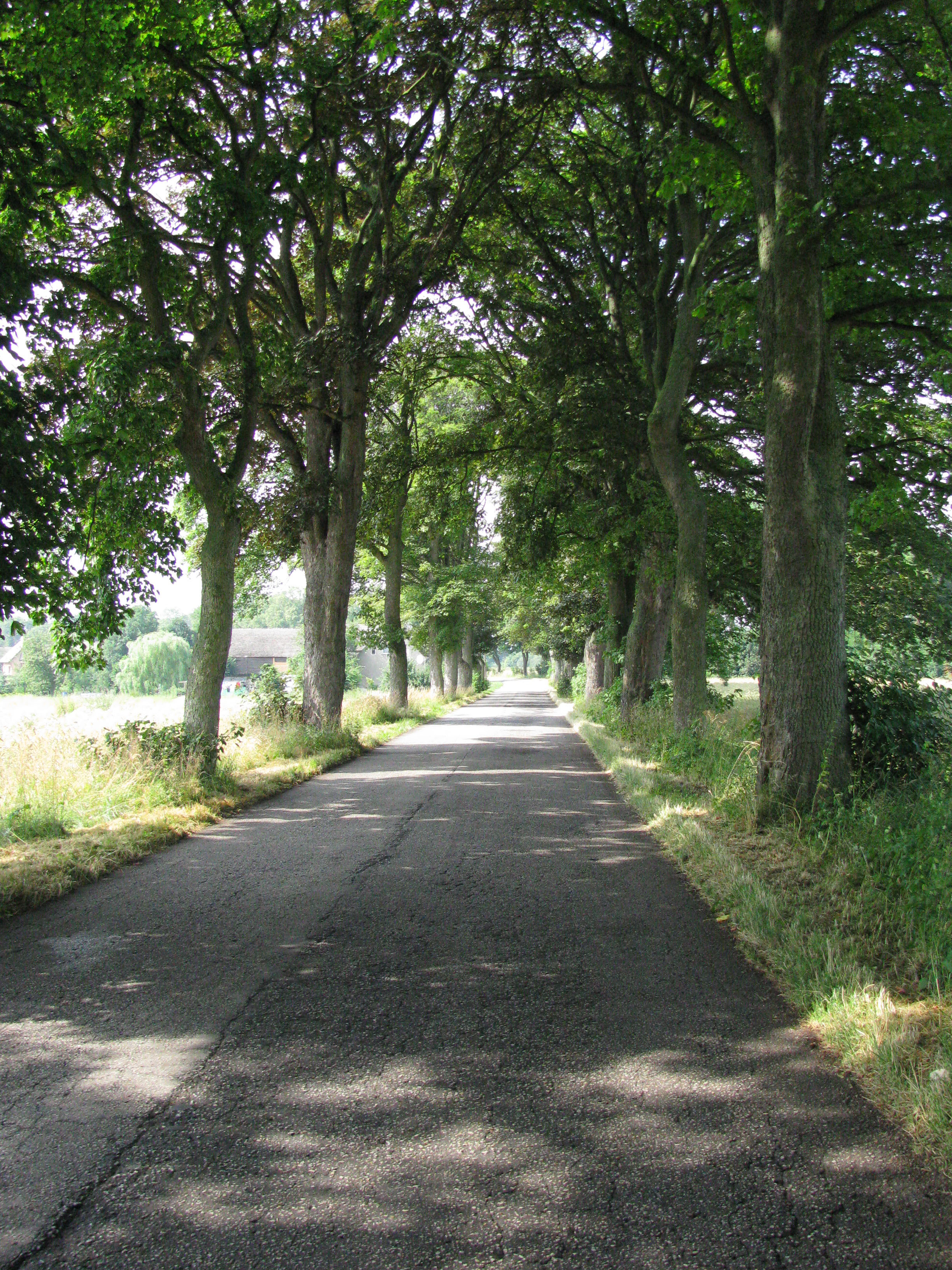 Ein Relikt aus deutschen Zeiten: eine der vielen Alleen auf der Insel, hier zwischen Kołczewo und der Stadt Wolin